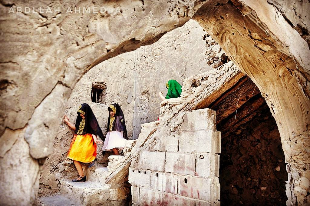 أطفال يُمارسون عادة الكريكشون في أحياء القلعة، تعود الصورة لتاريخ حديث.